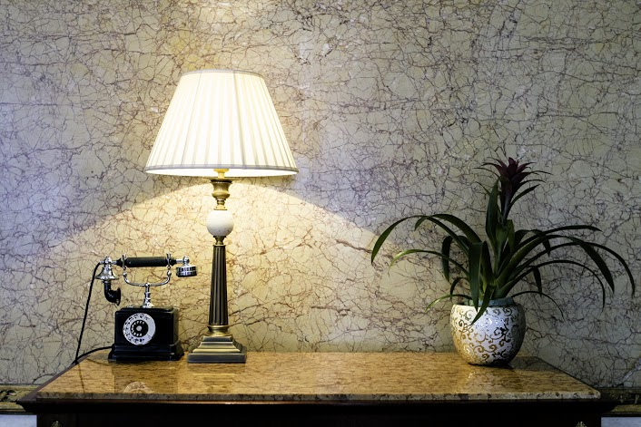 Grand Hotel Kraków